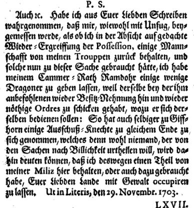 Johann Christian Lünig: Die Teutsche Reichs-Cantzley: Worinn zu finden Auserlesene Briefe, Welche ..., 6. Teil (1703-1710), Verlag Gleditsch, Leipzig 1714, S.182